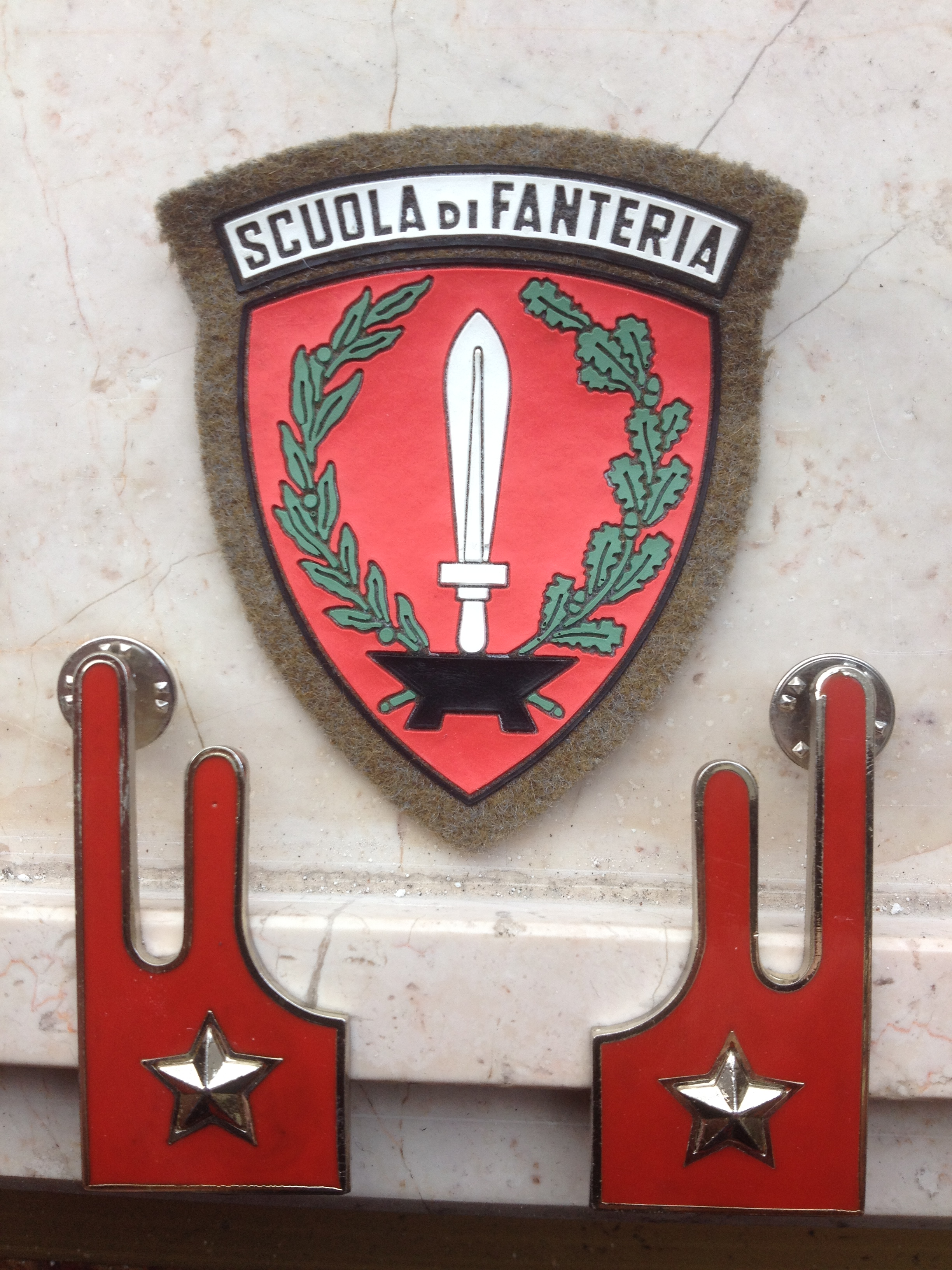 Stemma e Mostrine Scuola di Fanteria A.U.C. Cesano di Roma